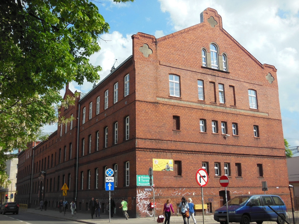 Zakład dla Ociemniałych, ob. Ośrodek Szkolno-Wychowawczy dla dzieci Niewidomych (1872-1879), ul. Krasińskiego 10 w Bydgoszczy